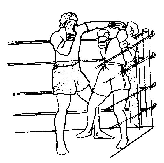 cadrage1.jpg